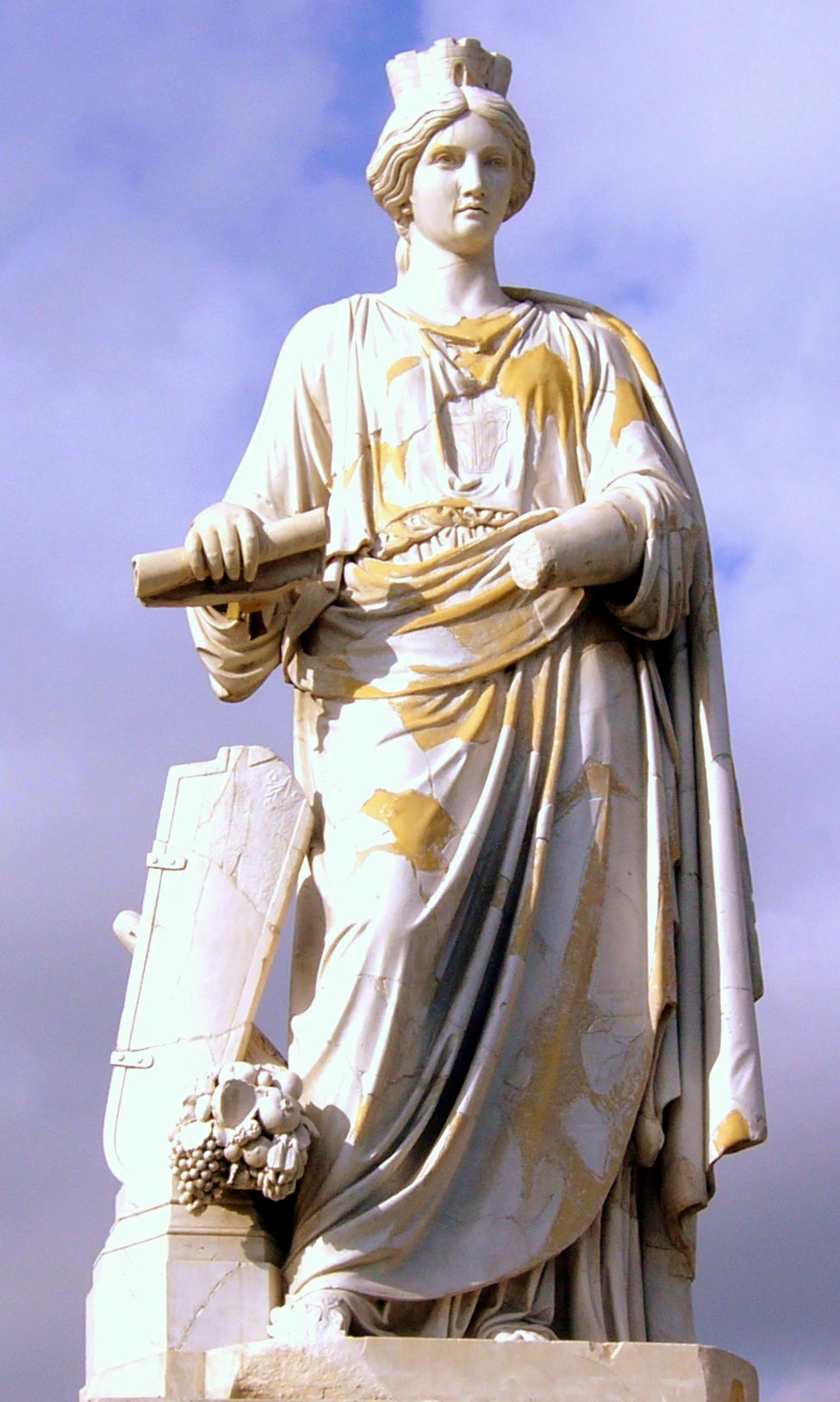 Statua con allegoria della città di Messina (a Messina)